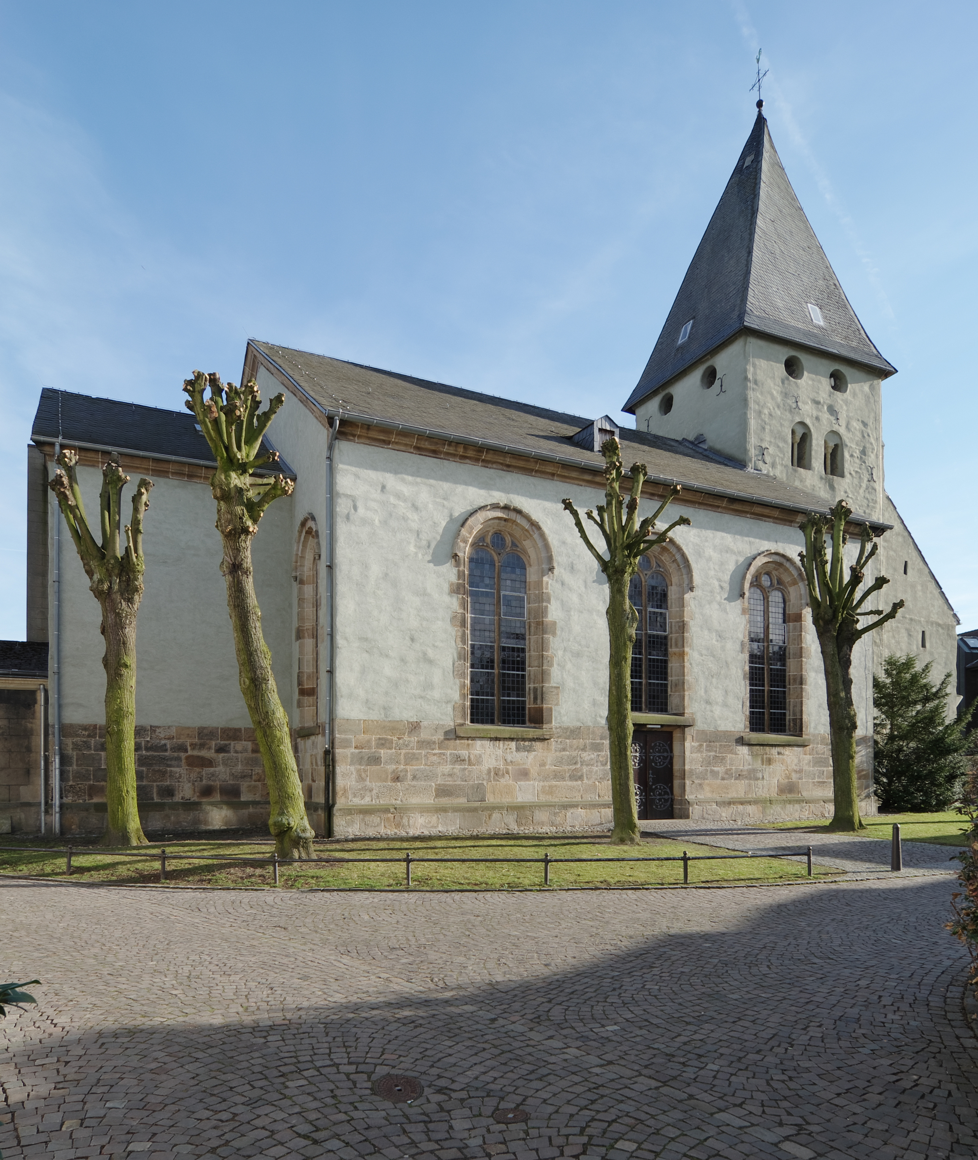 Kirche in Altbönen